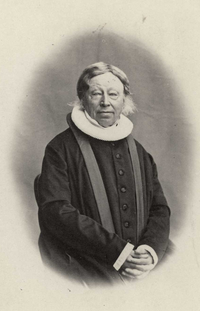 Sogneprest, ordfører og stortingsrepresentant Paul Winsnes (1794–1889). Ukjent fotograf, ca.1860–70. Fra Byhistorisk samling hos Oslo Museum. Inventarnummer: OB.F03816a.